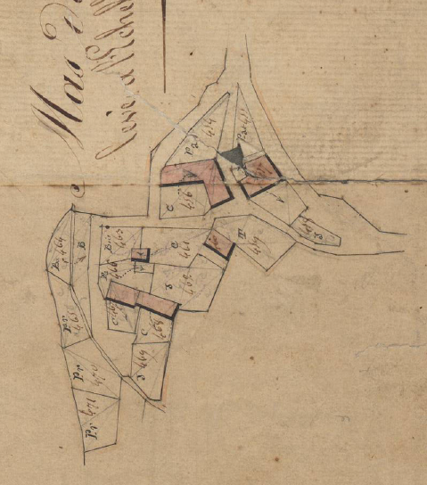 Veïnat del Mas d'en Gaula, d'Angostrina, en el Cadastre Napoleònic del 1812 (Arxius Departamentals dels Pirineus Orientals)